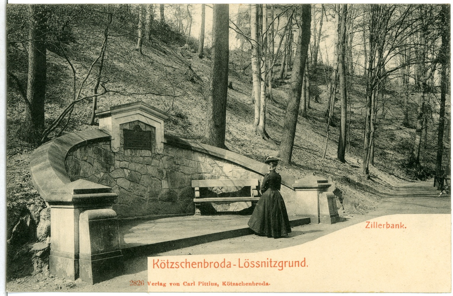 Kötzschenbroda; Lößnitzgrund, Zillerbank This postcard is from publisher Brück & Sohn in Meißen ( postcard has a unique number 02826 and is available in a higher resolution at the publisher. This images was uploaded in a cooperation project between Wikipedians and the publisher.